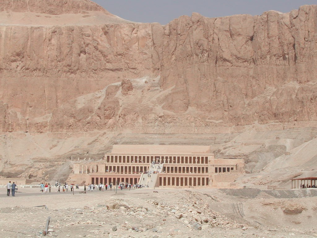 Egypten - Doudentempel vum Hatschepsut.